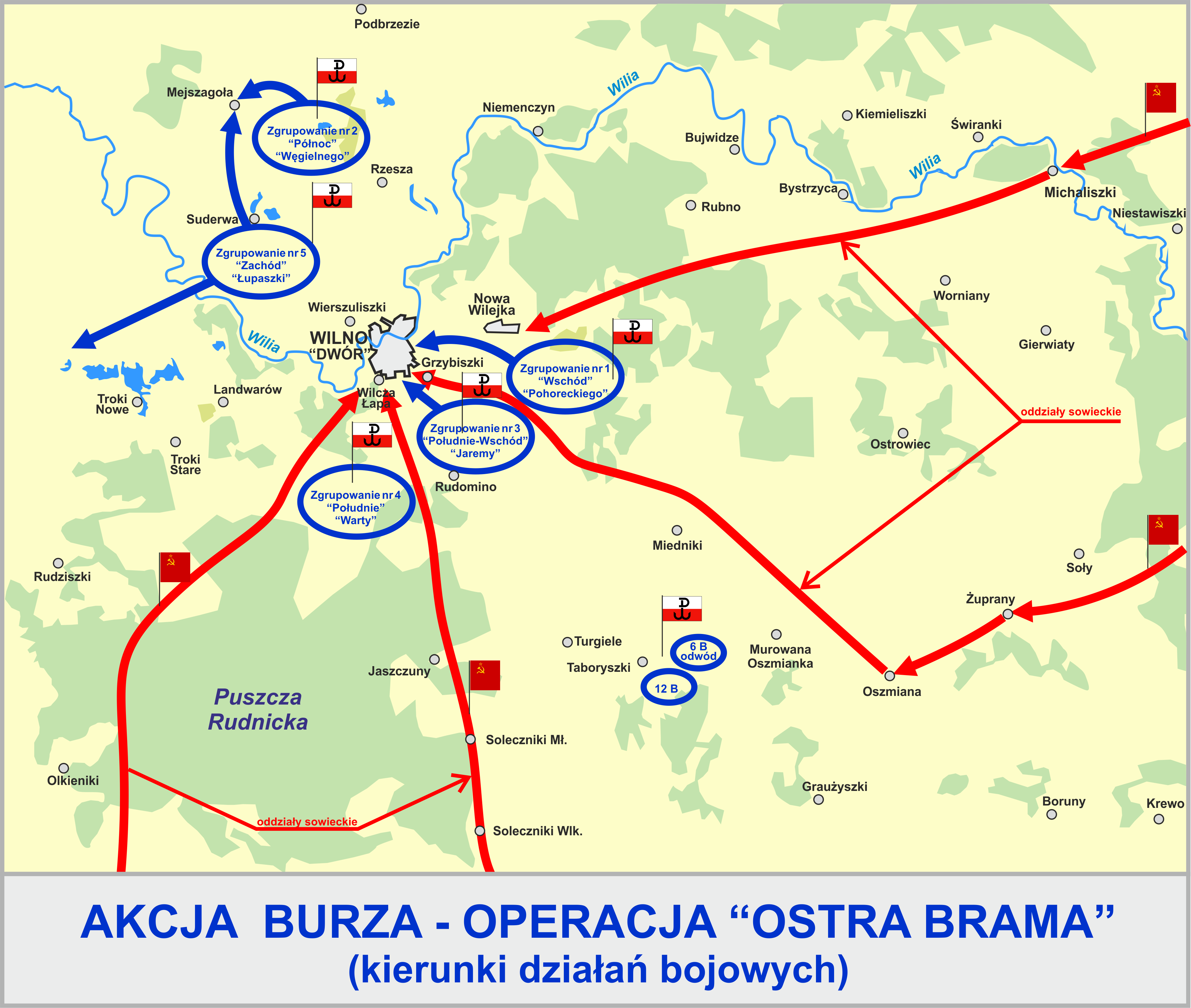 Akcja Burza - Operacja "Ostra Brama" (kierunki działań bojowych)